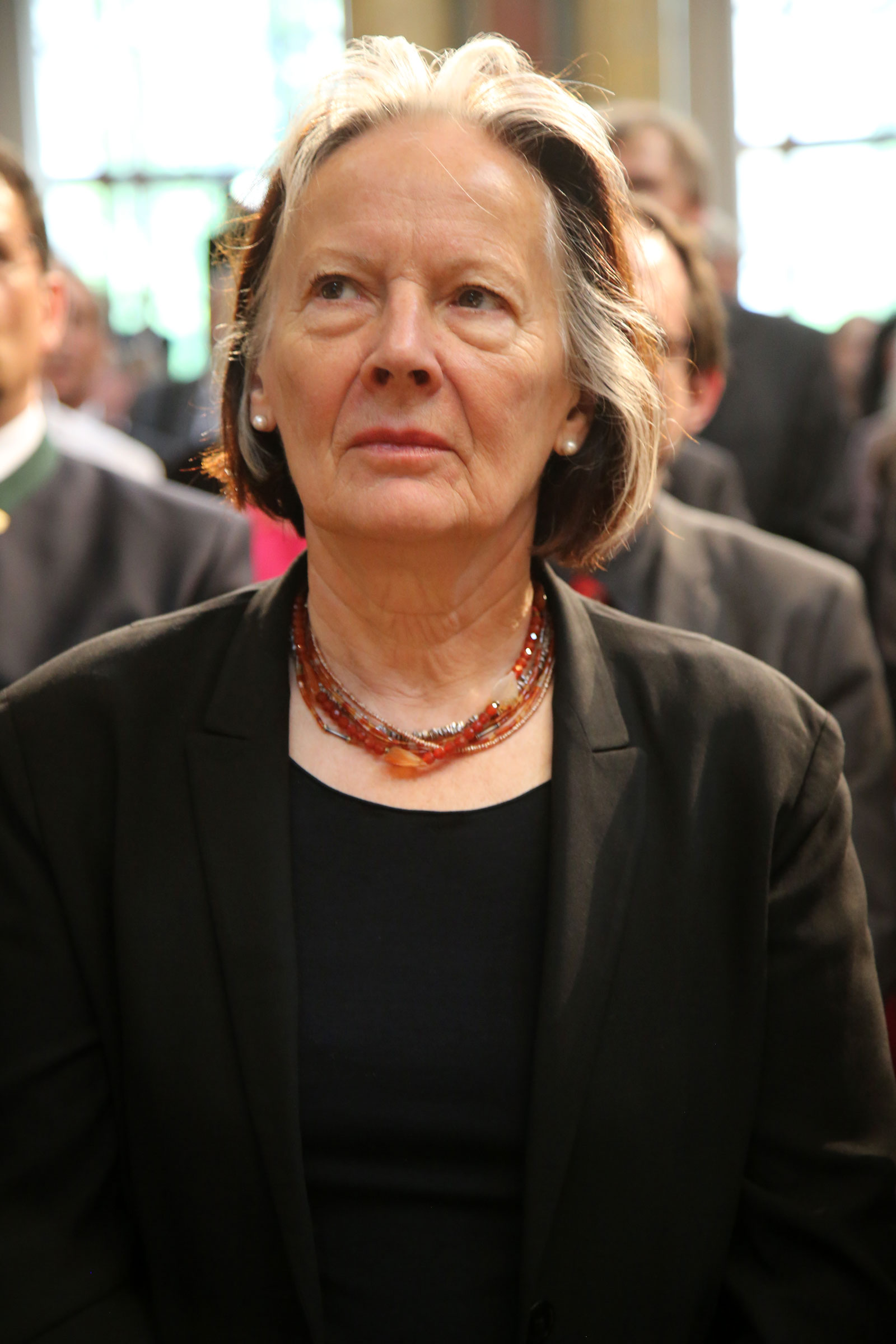 Dürkop-Leptihn_Marlis-1631